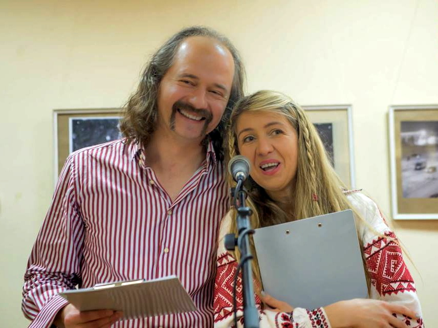 Вядучыя Паэтычнага тэатра «Арт.С» Яраш Малішэўскі і Аксана Спрынчан